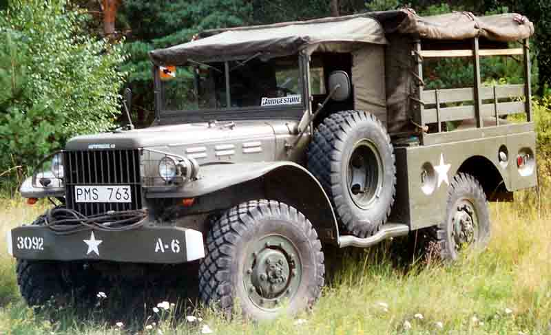 Dodge WC